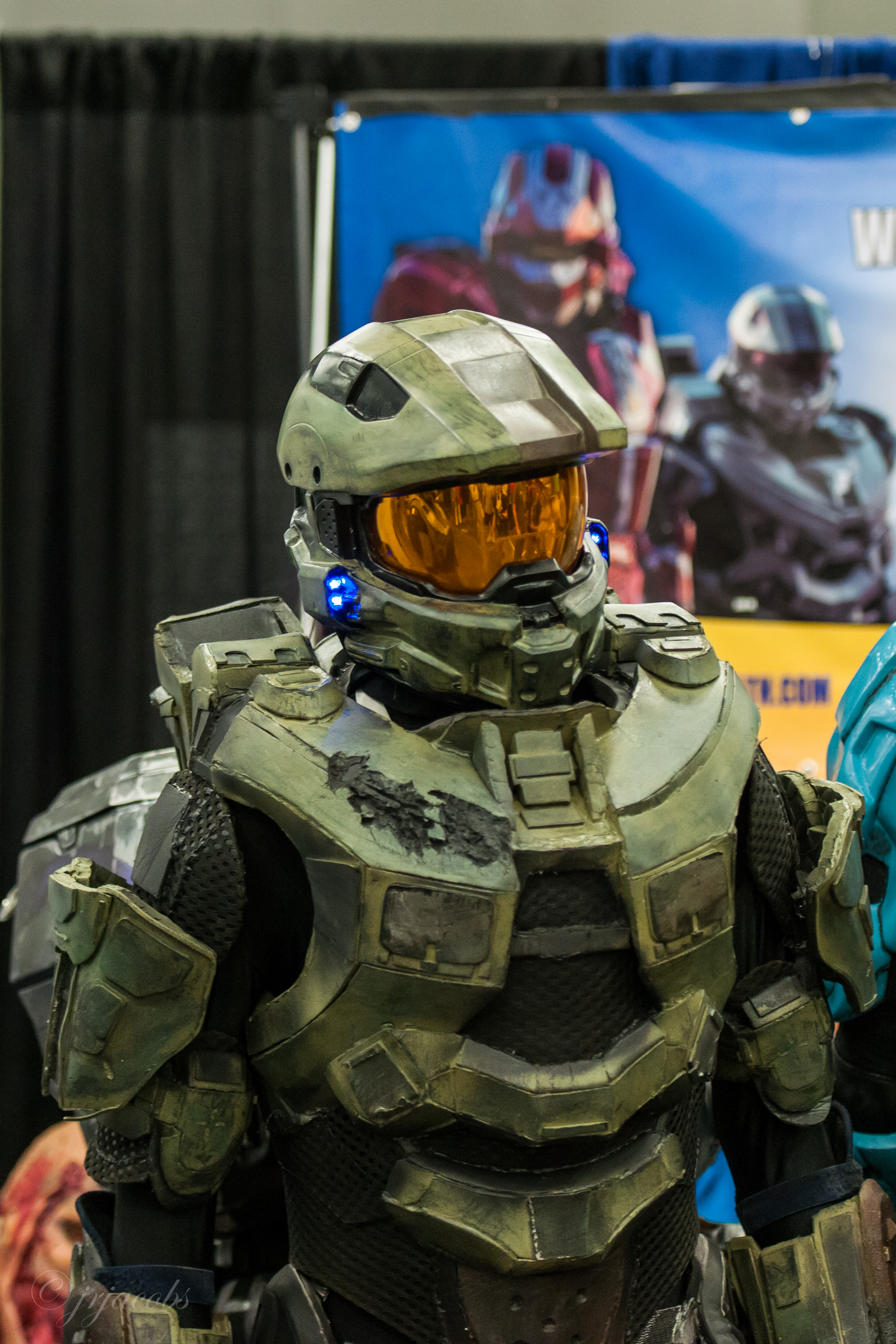 Halo spartan cosplay. Taken at RTX 2013.